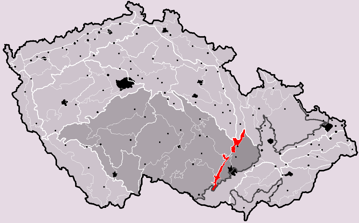 Poloha geomorfologického celku Boskovická brázda v rámci České republiky. Hercynský systém Hercynská pohoří I Česká vysočina I2 (II) Česko-moravská subprovincie I2D (IID) Brněnská vrchovina I2D-1 (IID-1) Boskovická brázda